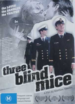 Titan View